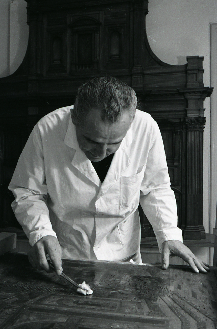 Servizio fotografico : Bologna, 1971 / Paolo Monti. - Strisce: 6, Fotogrammi complessivi: 35 : Negativo b/n, gelatina bromuro d'argento/ pellicola ; 35 mm. - ((Sul portanegativi: NIKORMAT Tri-x. - Occasione: Documentazione per la pubblicazione: Fleming John, Honour Hugh, Pevsner Nikolaus, Dizionario d'architettura, Torino, Einaudi, 1981. - : La conservazione come pubblico servizio: ipotesi per un piano di tutela, intervento e riqualificazione dei beni artistici e culturali mobili delle provincie di Bologna, Ferrara, Forlì e Ravenna: 1971-1975, Bologna, Edizioni Alfa (1971). - Fonte: Agenda di Paolo Monti: Leica 1501-3000 Controllo numerazione (1950-1978), presso Archivio Paolo Monti. - Fonte: Fattura di Paolo Monti: IV. Commesse/ Fattura n. 25/ Riprese fotografiche per Mostra attività Soprintendenza La conservazione come pubblico servizio (1971/09/07), presso Archivio Paolo Monti. 345 riprese fotografiche di oggetti, quadri, affreschi, attività di restauro di ogni tipo di opere e di materiali, metodi di conservazione nell'ambito del territorio. - Fonte: Monografia di Emiliani, Andrea (a cura di)